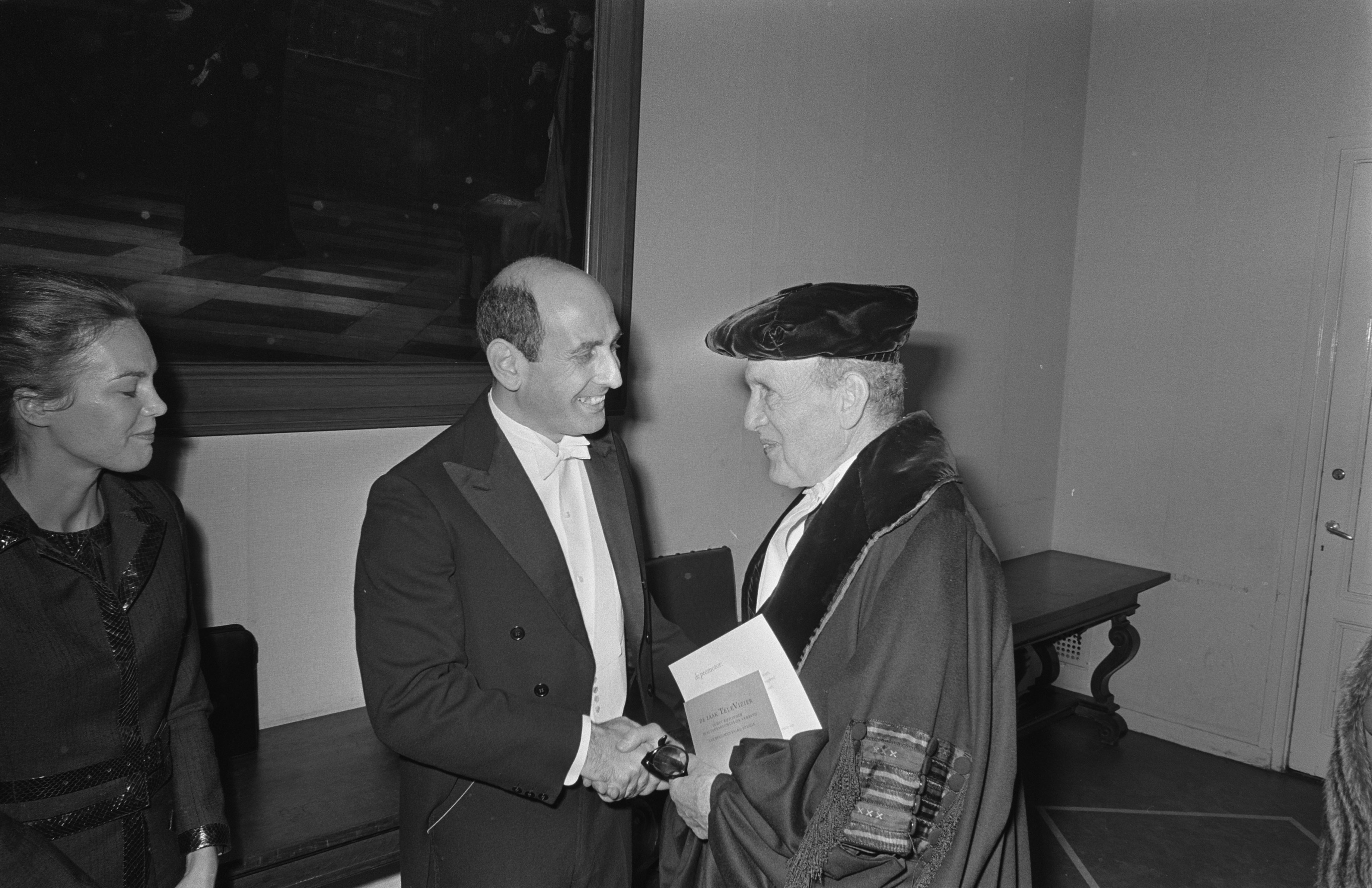 Collectie / Archief : Fotocollectie Anefo Reportage / Serie : Mr Louis van Vollenhoven promoveert Beschrijving : L. van Vollenhoven , directeur Nederlandse Rotogravure Mij , promoveert in aula Universiteit, Amsterdam, hij wordt gefeliciteerd door zijn promotor prof. dr. E.D. Hirsch Balin Datum : 3 juli 1970 Locatie : Amsterdam, Noord-Holland Trefwoorden : communicatierecht, directeuren, hoogleraren, infomatierecht, promoties Persoonsnaam : Hirsch Ballin E.D., Vollenhoven, L. van Fotograaf : Fotograaf Onbekend / Anefo, [onbekend] Auteursrechthebbende : Nationaal Archief Materiaalsoort : Negatief (zwart/wit) Nummer archiefinventaris : bekijk toegang 2.24.01.05 Bestanddeelnummer : 923-6426